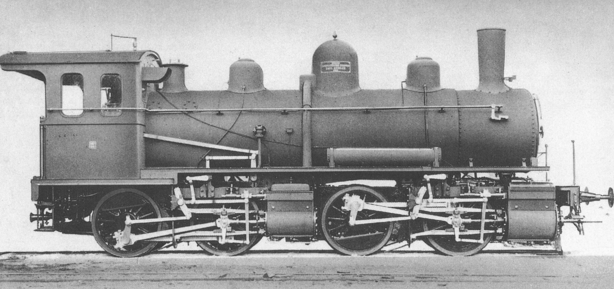 Dampflokomotive Badische VIII c.